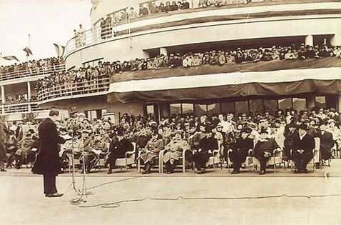 A Budaörsi Repülőtér megnyitása 1937. június 20-án. Horthy István beszéde.